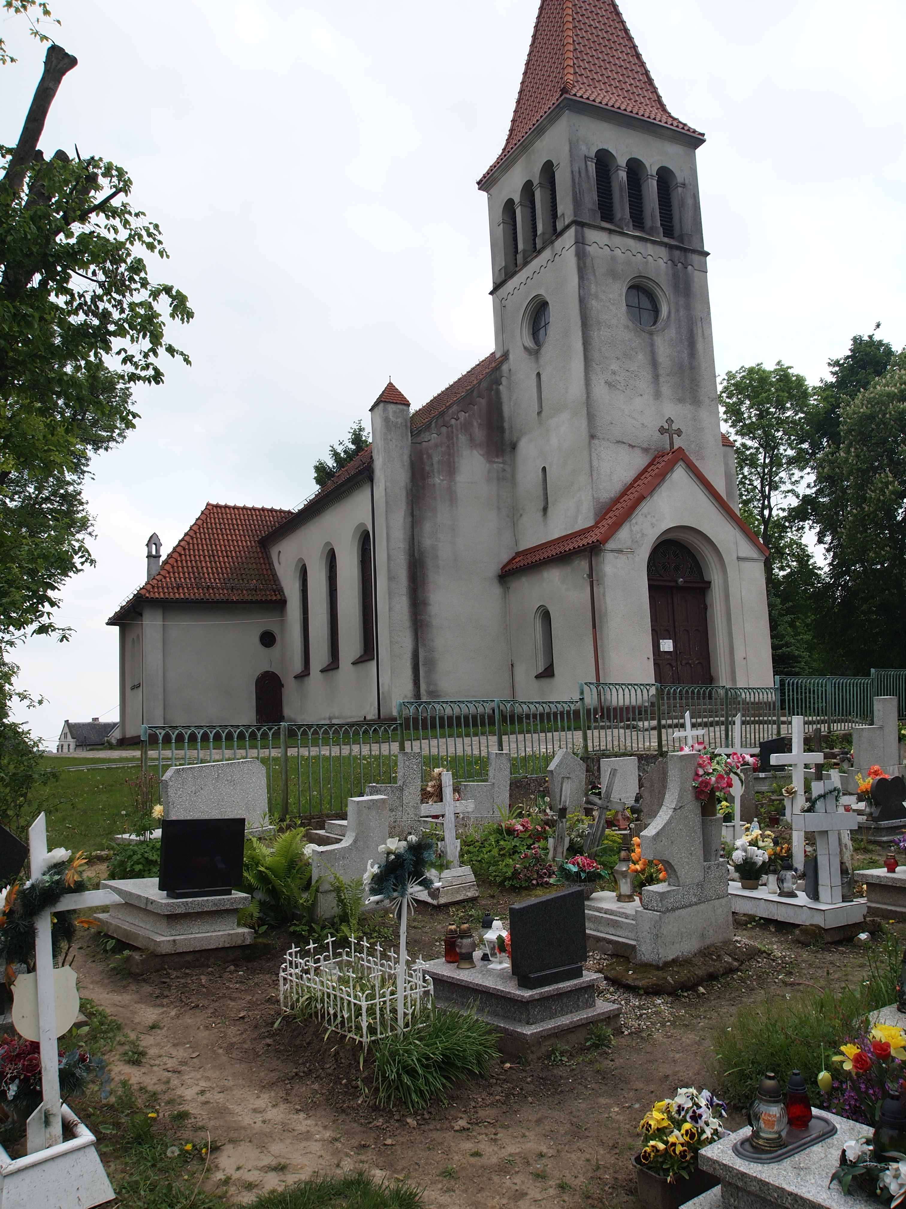 Nowa Wioska - rzymskokatolicki kościół parafialny p.w. Zwiastowania NMP, 1844-1845